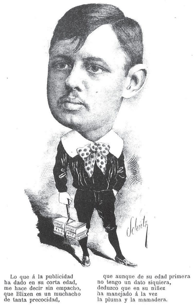 Samuel Blixen